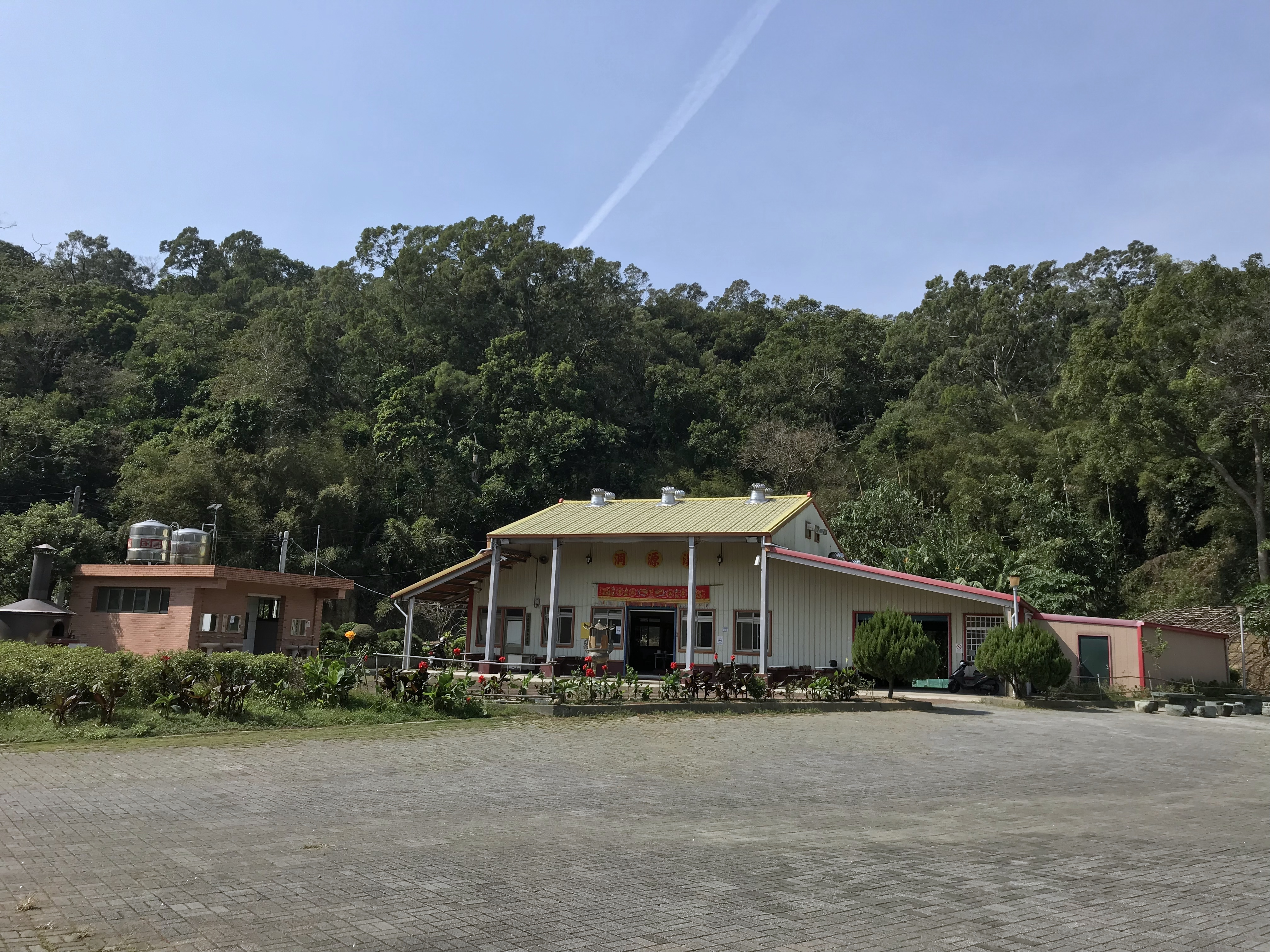 中文（台灣）: 大壢老仙爺廟